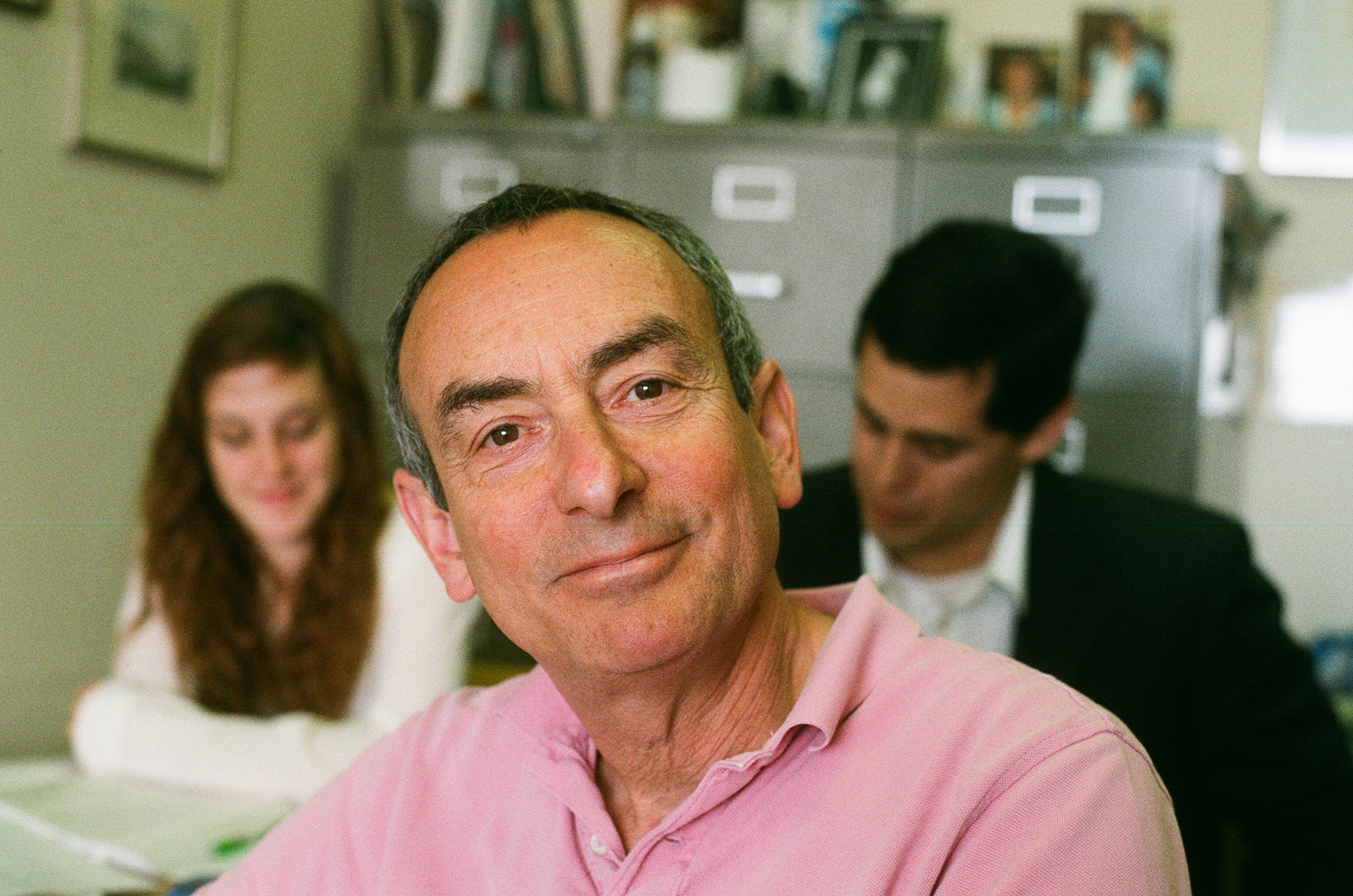 Foto di Kenneth Alan Ribet